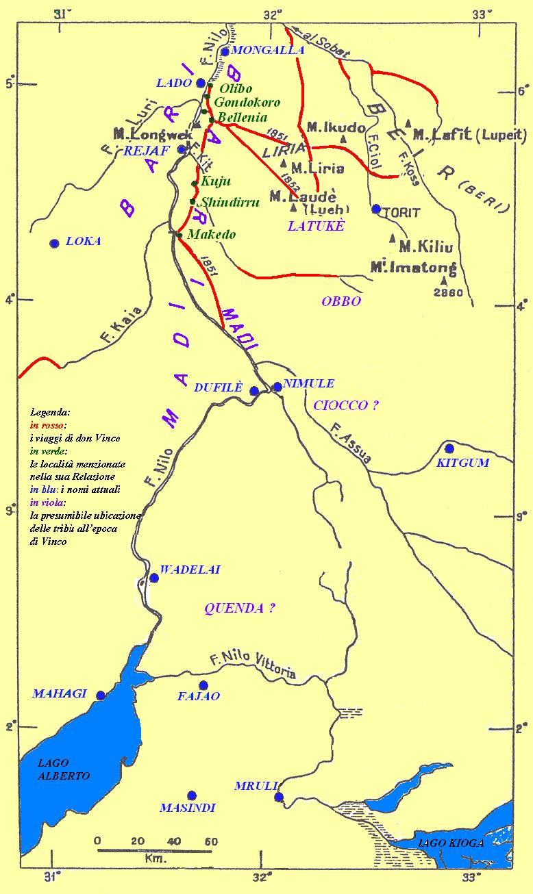 I viaggi esplorativi di don Angelo Vinco negli anni 1851-1852